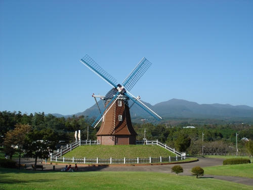 ぐりーんふらわー牧場･大胡 オランダ型風車